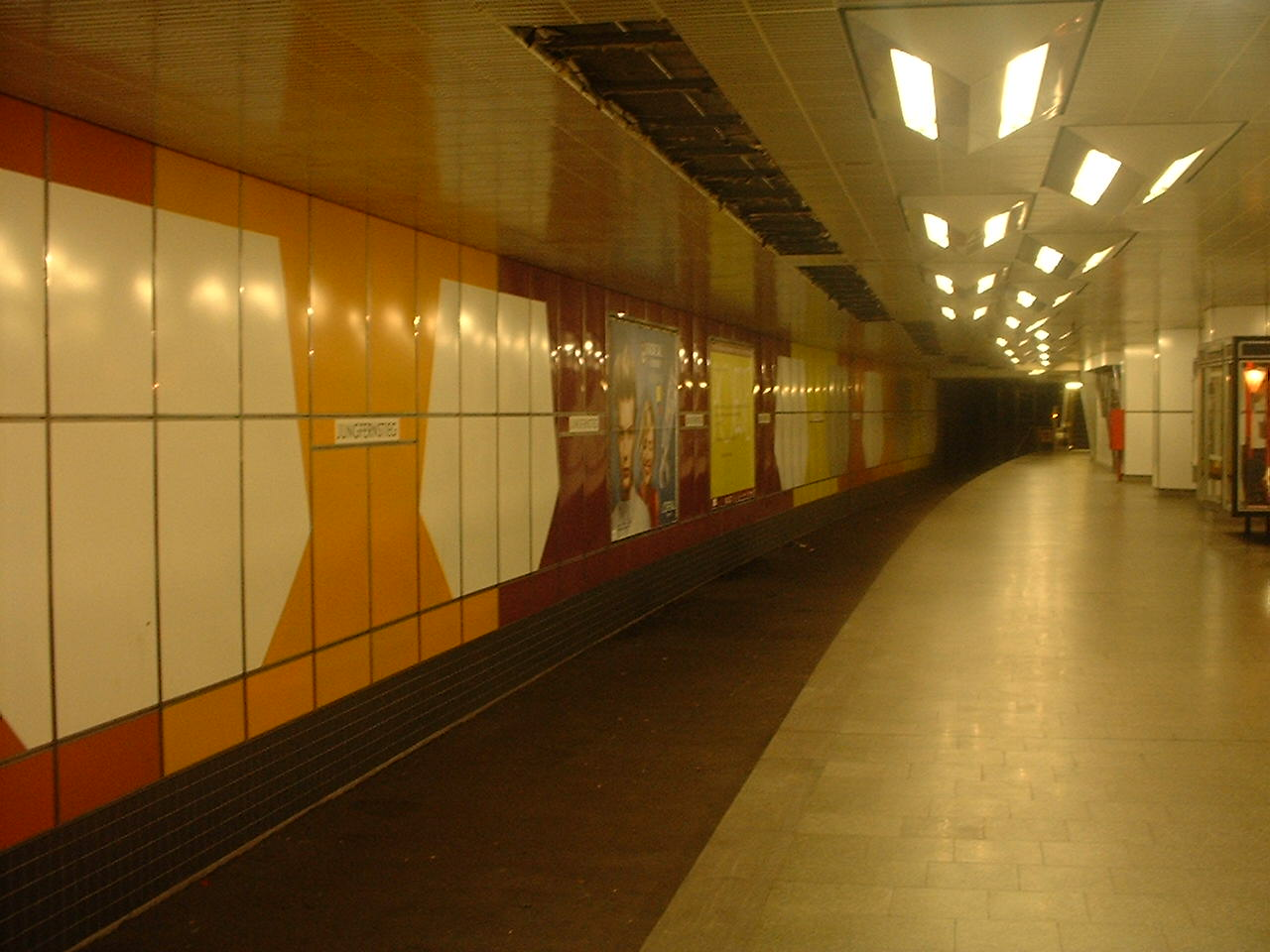 Ungenutzter Gleistrog im Hamburger U-Bahnhof Jungfernstieg, unterste Ebene (U2/U4).